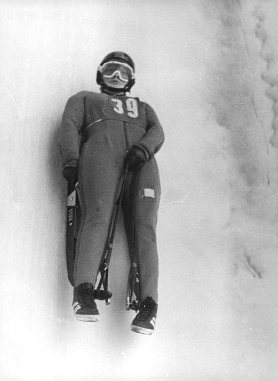 Margit Schumann ADN-ZB Demme 12.12.1976-Oberhof: Margit Schumann erfolgreich-Bei einem weiteren Überprüfungsrennen der DDR-Spitzenklasse im Rennschlittensport auf der künstlich vereisten Oberhofer Bahn, kam Olympiasiegerin Margit Schumann (ASK Vorwärts Oberhof-Foto von einem früheren Wettkampf) in ihrem zweiten Rennen nach einer Verletzungspause zu dem klarsten Erfolg.